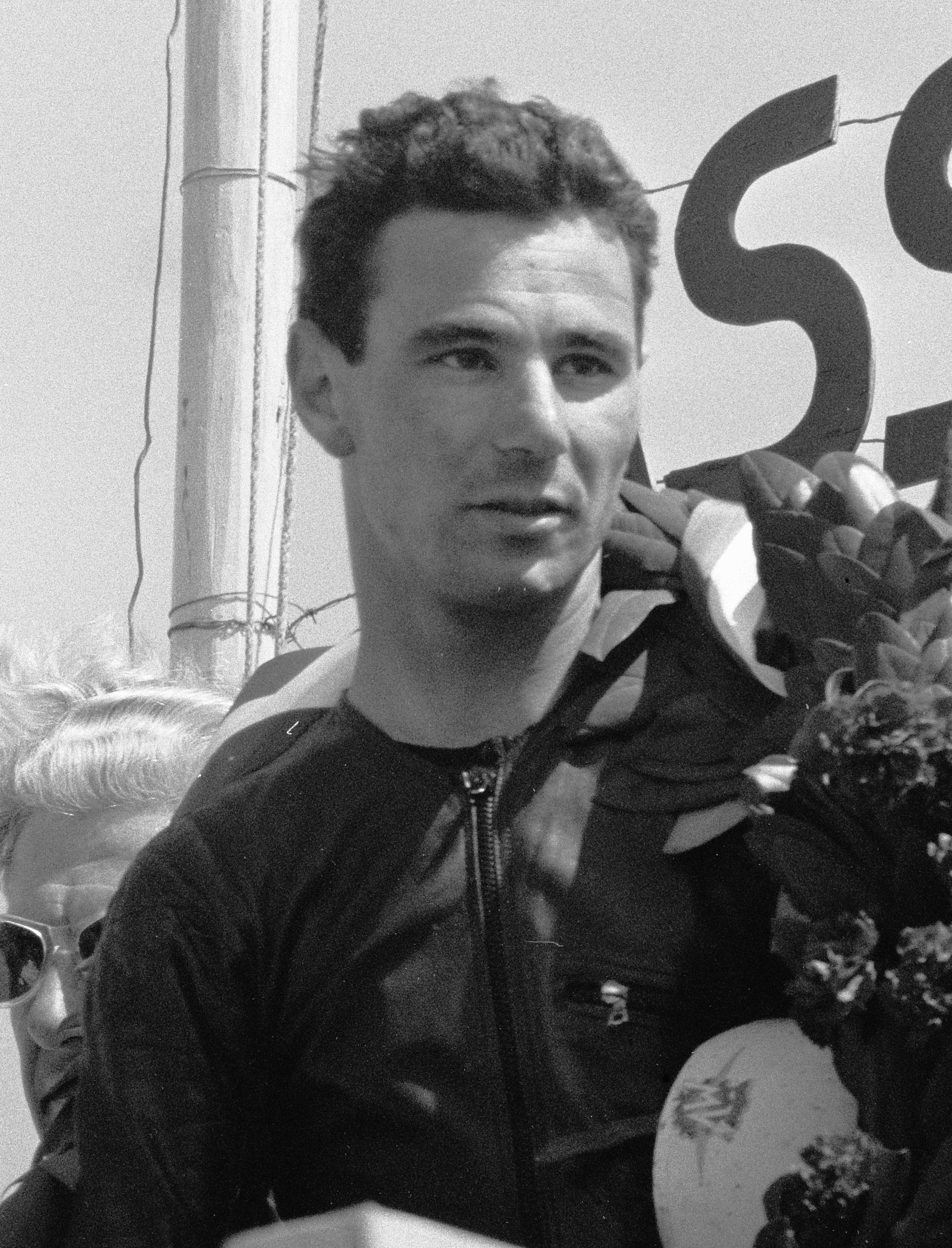 Collectie / Archief : Fotocollectie Anefo Reportage / Serie : TT Assen 1960 Beschrijving : Huldiging Carlo Ubbiali (winnaar 125cc en 250cc) Datum : 26 juni 1960 Locatie : Assen Trefwoorden : motorsport Persoonsnaam : Ubbiali, Carlo Instellingsnaam : TT Fotograaf : Bilsen, Joop van / Anefo Auteursrechthebbende : Nationaal Archief Materiaalsoort : Negatief (zwart/wit) Nummer archiefinventaris : bekijk toegang 2.24.01.05 Bestanddeelnummer : 911-3659